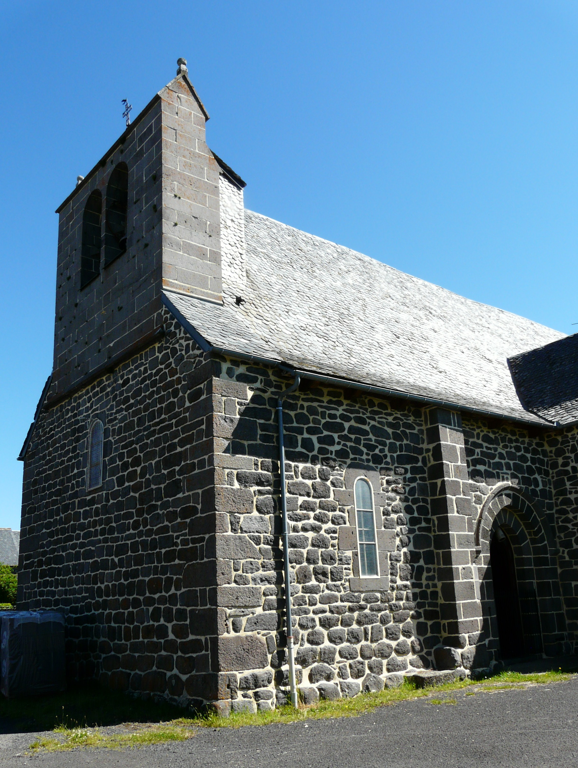 L'église de Sériers, Cantal, France.